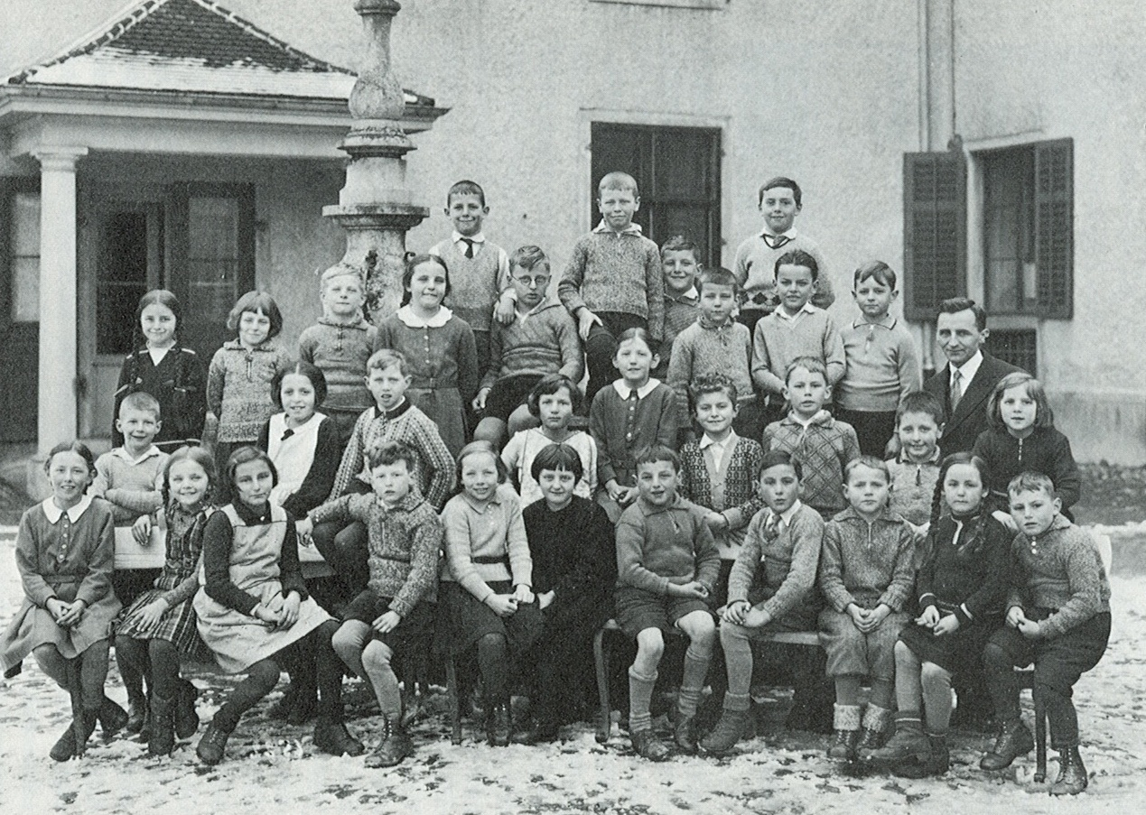 Übungsschul-Klasse in Küsnacht